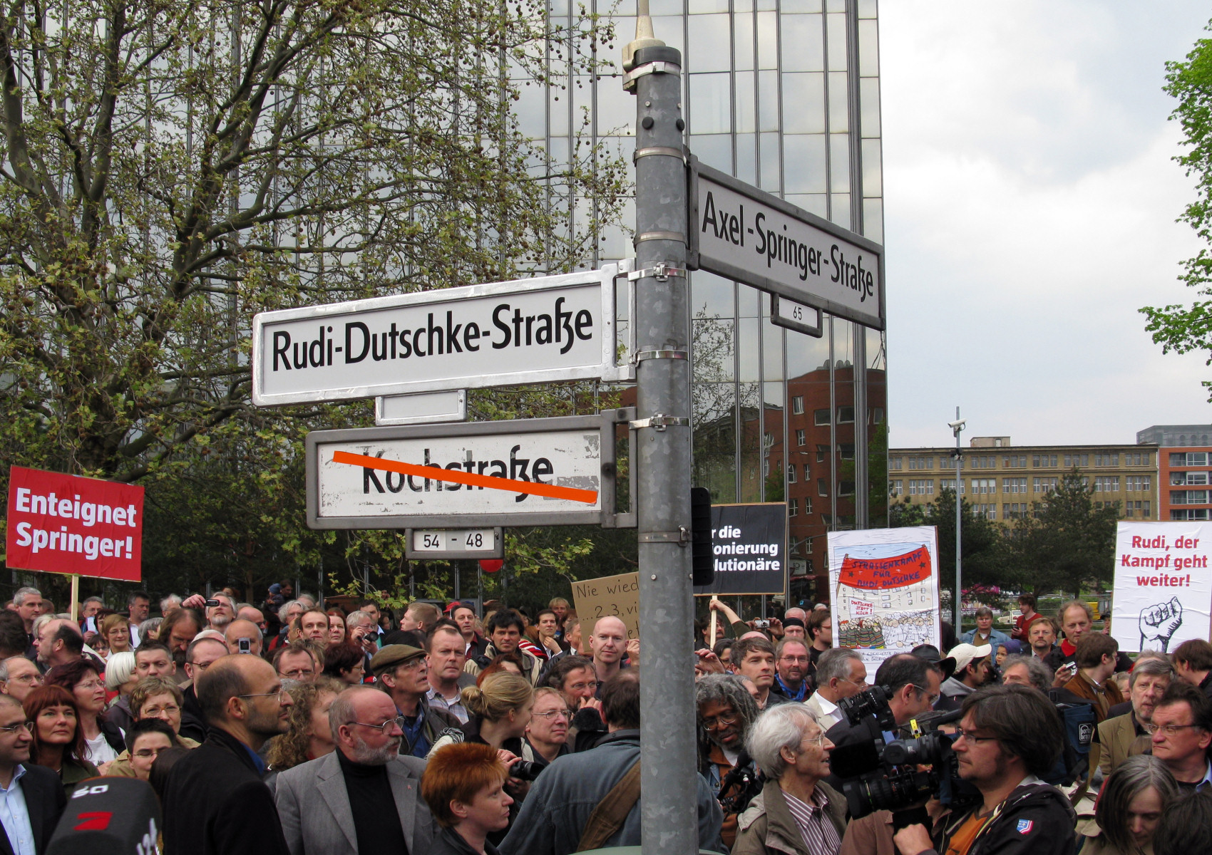 Umbenennung eines Teils der Kochstraße in Rudi-Dutschke-Straße, 30. April 2008, Berlin-Kreuzberg